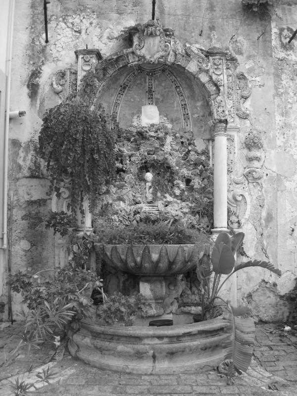 Fontana del Convento di Baida